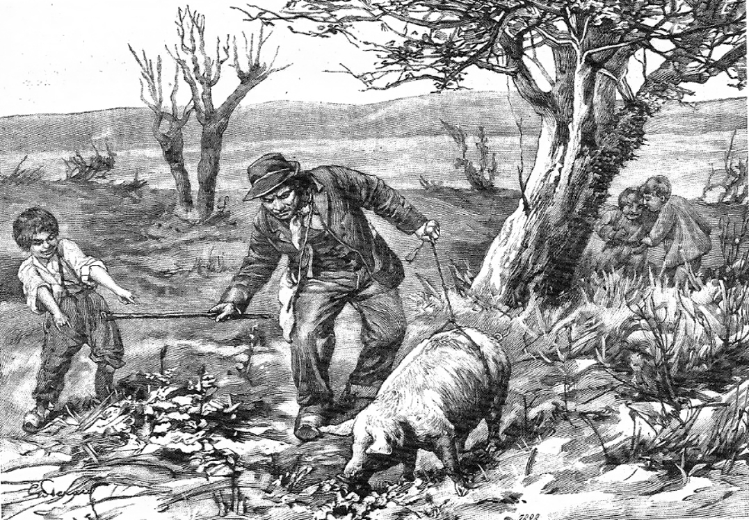 La récolte des truffes en Périgord. Le cochon truffier